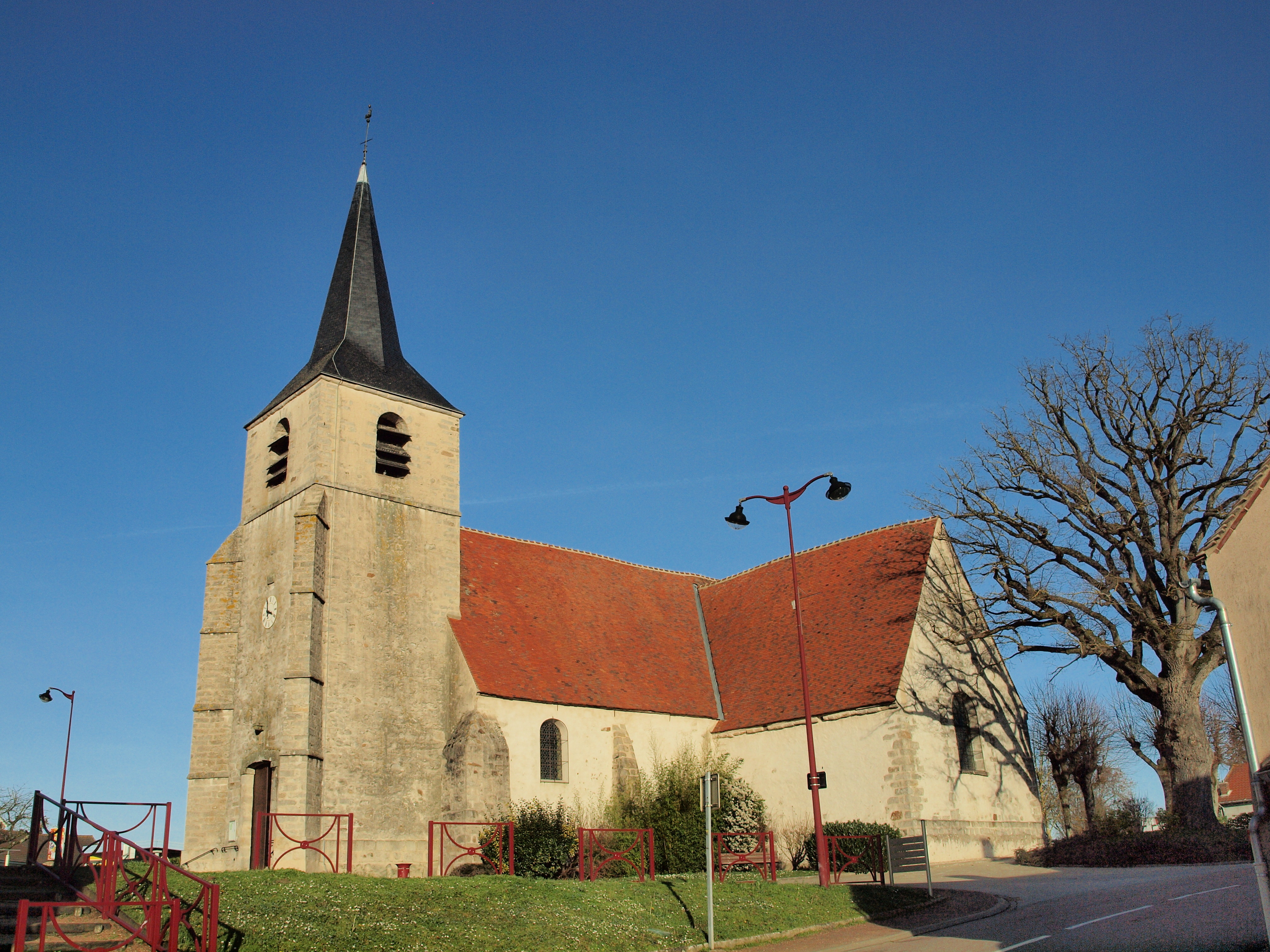 Église Saint-Germain de Gron (Yonne, France) ; extérieur.